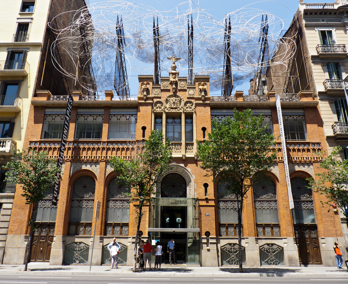 Barcelona Paseo de Gracia 1397 23 de julio de 2011